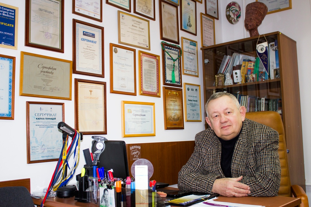 Пластичний хірург Каліка Геннадій Маркович